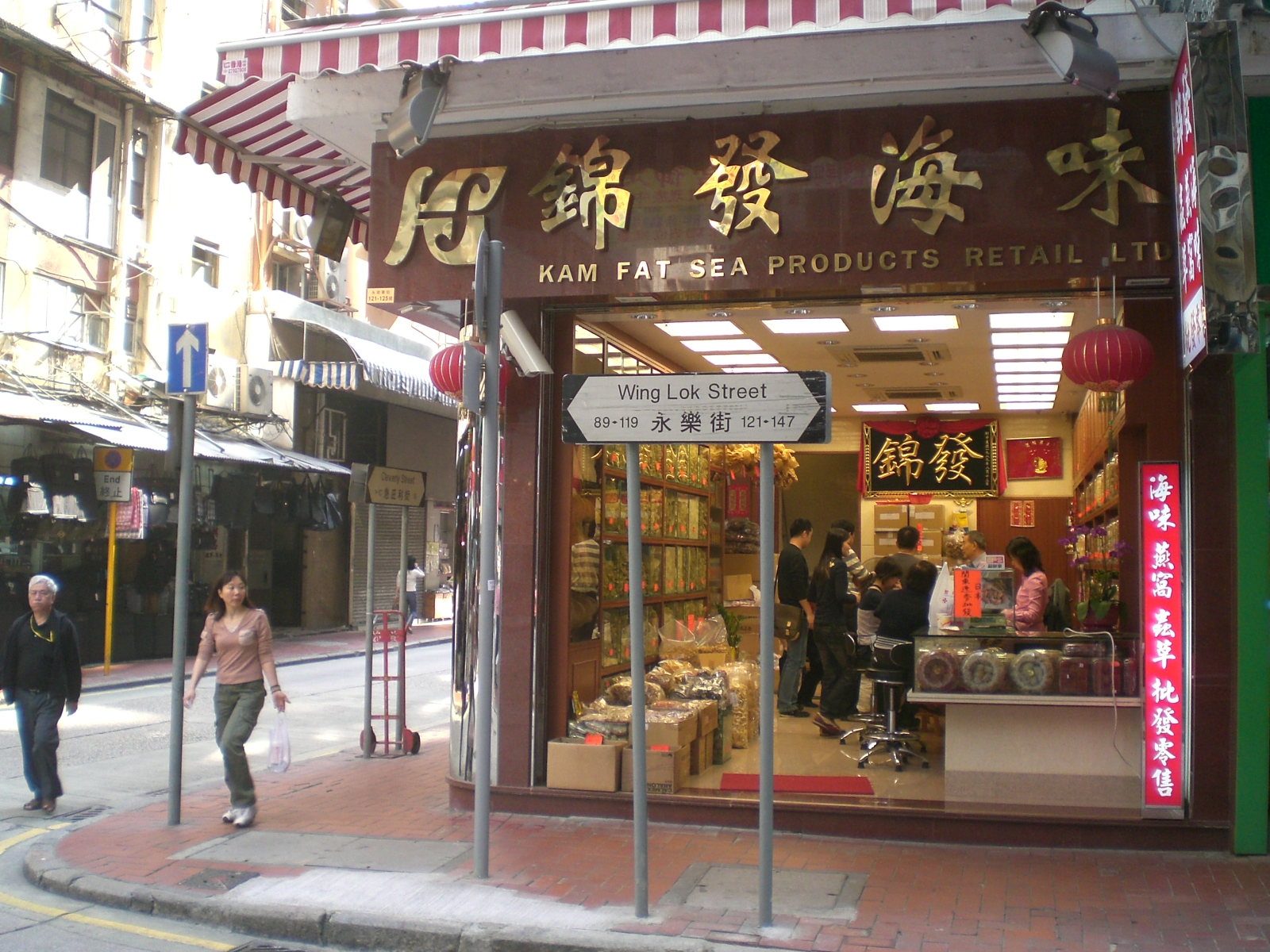 Wing Lok Street, Sheung Wan 上環 永樂街